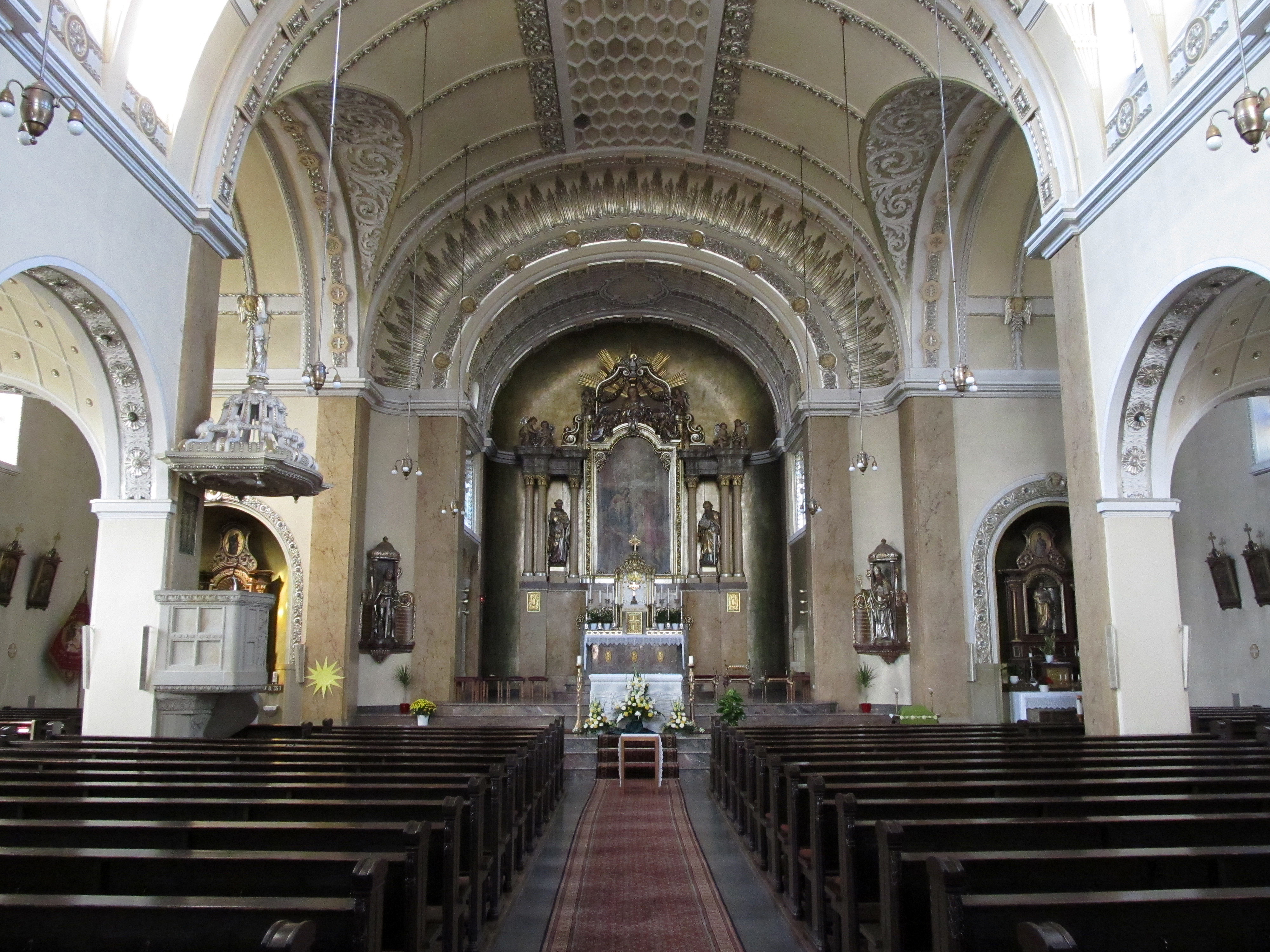 Blick ins Innere der katholischen Kirche St. Katharina in Scheuern, Gemeinde Tholey, Saarland